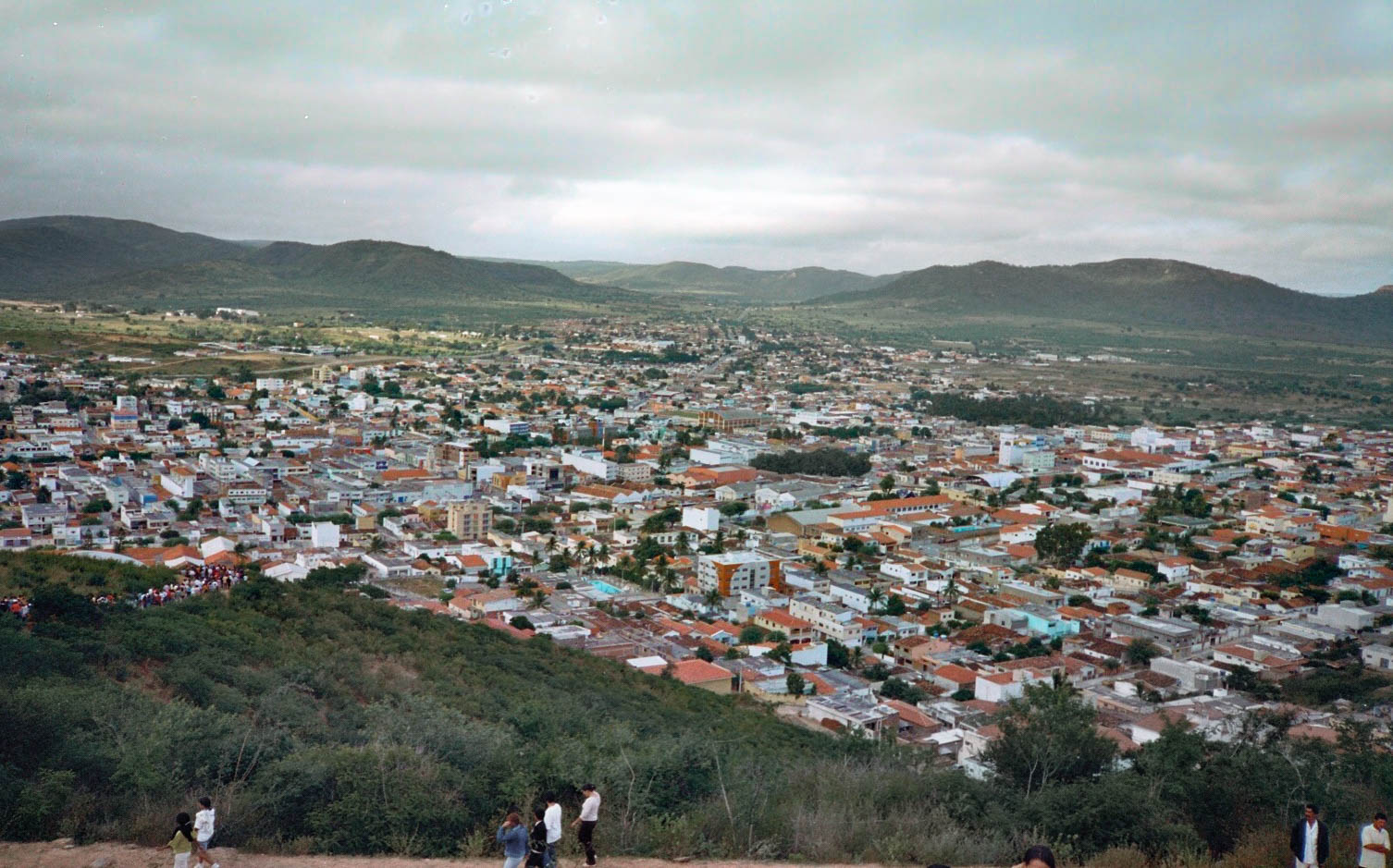 Arcoverde-PE, Brasilien von seinem Hausberg